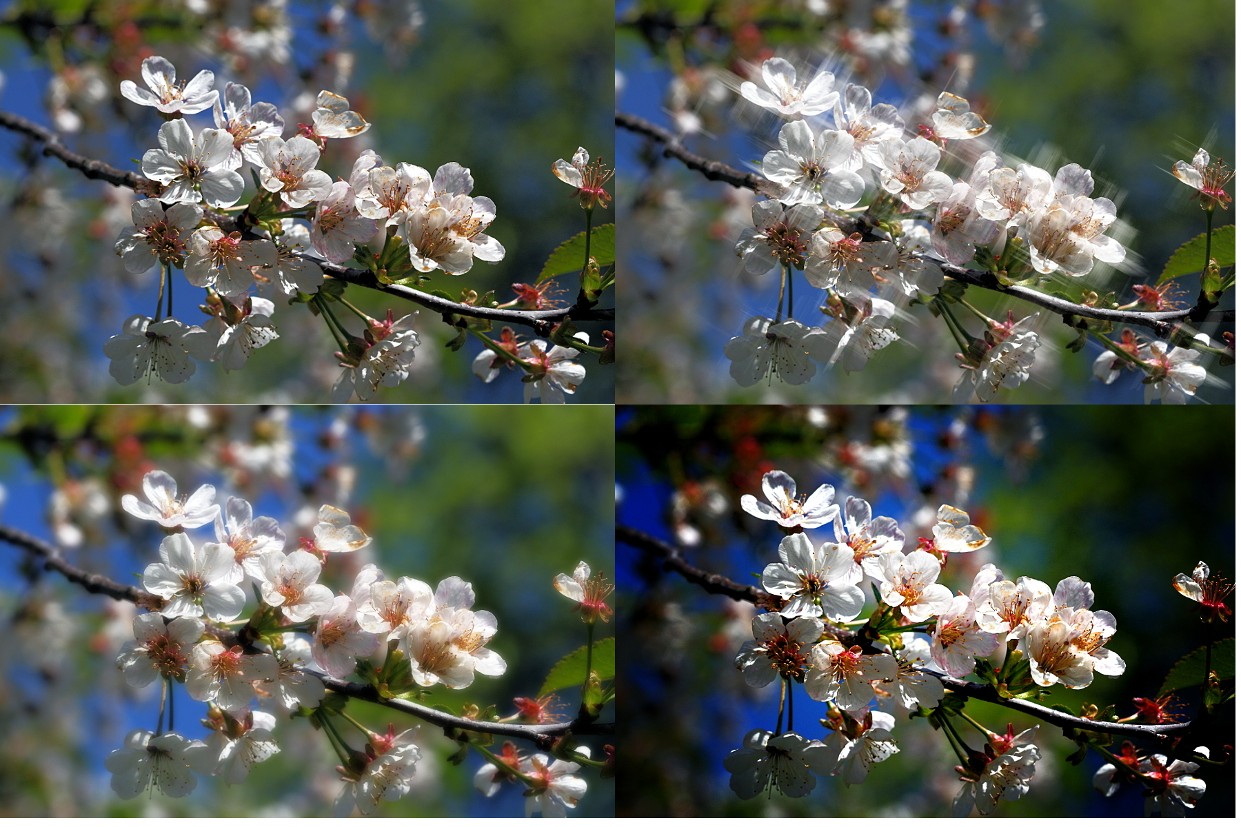 Sauerkirsche (FX Foundry) - oben links das Original-Foto, oben rechts Cross light effect, unten links Diffusion filter und unten rechts LOMO look.